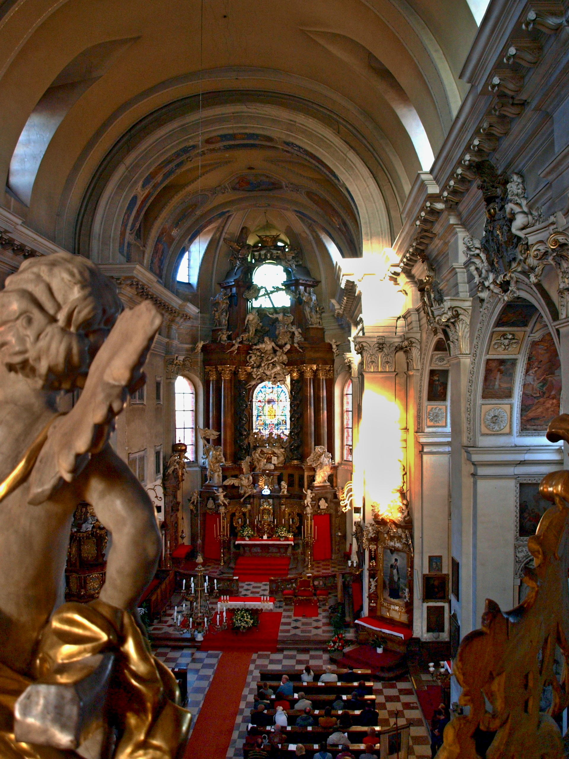 Kostel Nanebevzetí Panny Marie ve Staré Boleslavi